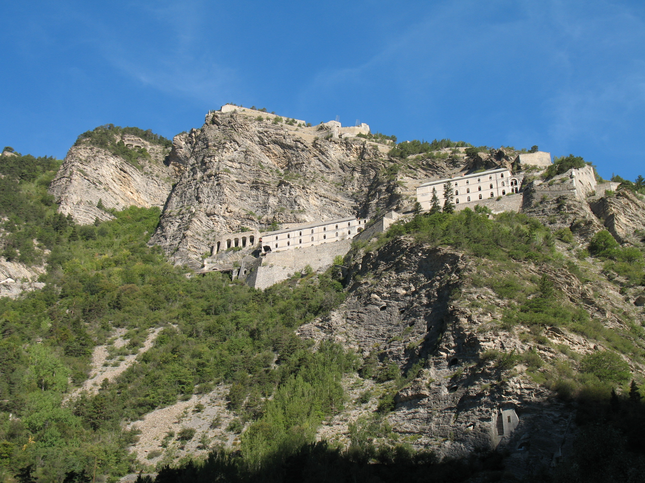 Jausiers, département des Alpes-de-Haute-Provence, France Fortìfication